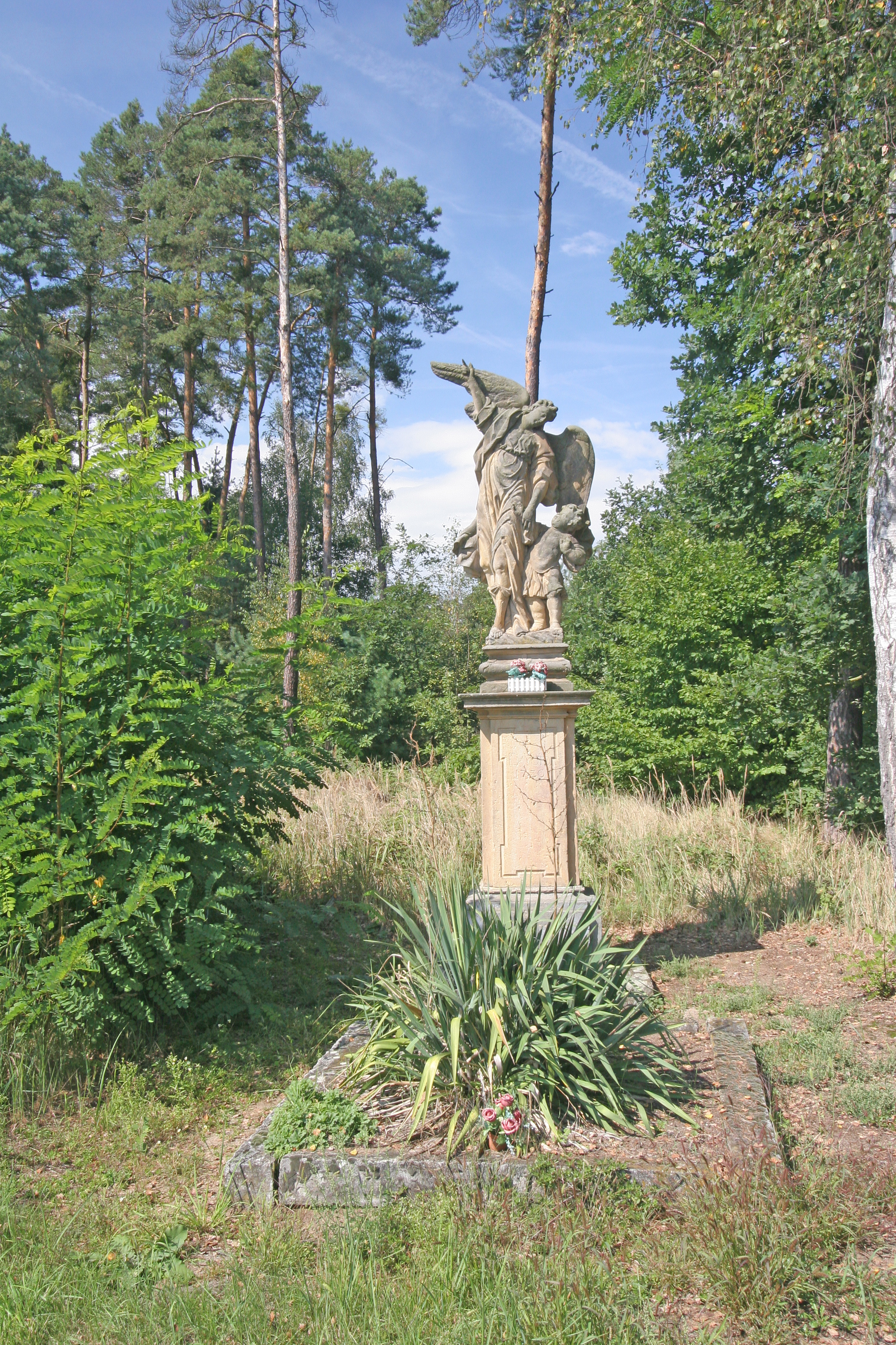 Socha Anděla Strážce, okraj obce, směr Kolesa, Kladruby nad Labem.